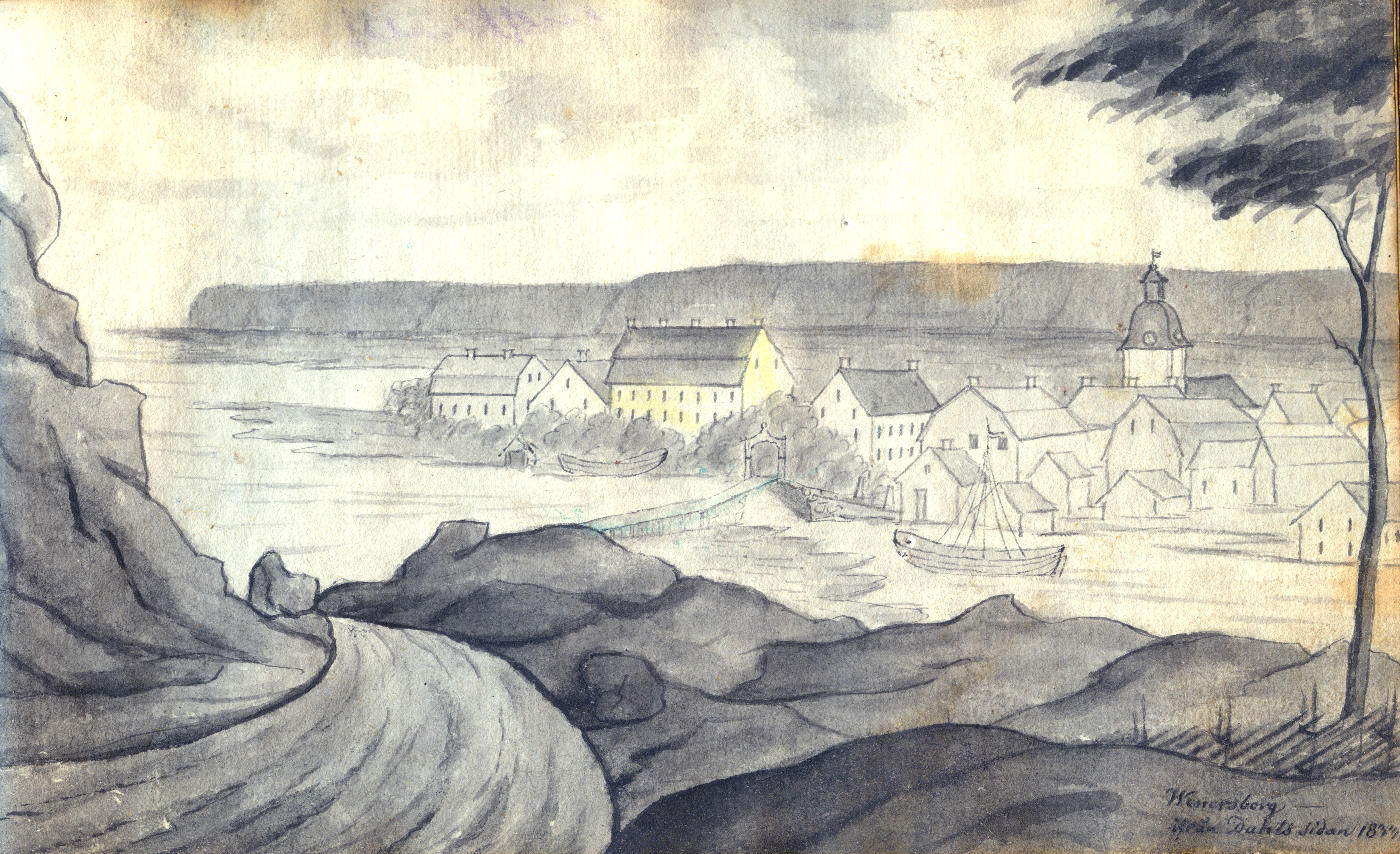 Laverad tuschteckning av utsikt mot Vänersborg från Dalslands sida av Vänern, daterad 1833 Källa: Stifts- och landsbiblioteket i Skara: MS Geografi Västergötland 1, bild 40